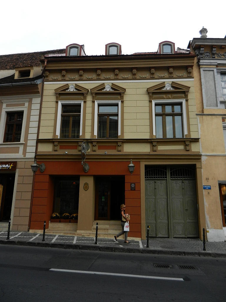 Casa Stefanovitsch